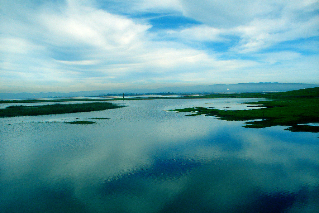 Desembocadura del río Biobío, Chile